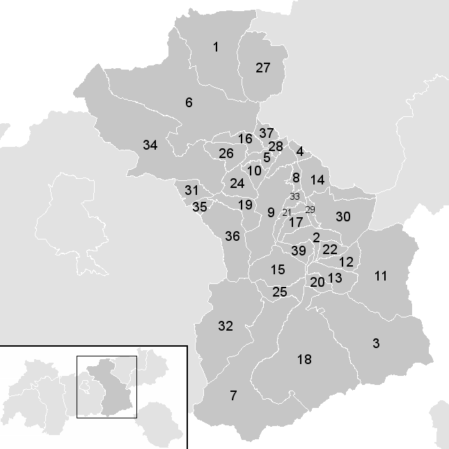 Leere Karte mit den Gemeinden im Österreichischen Bezirk Schwaz